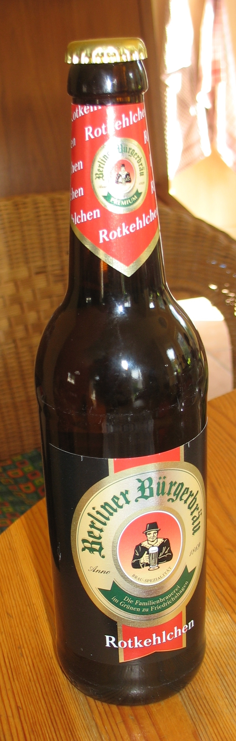 Bottle of Berliner Buergerbrau Rotkelchen